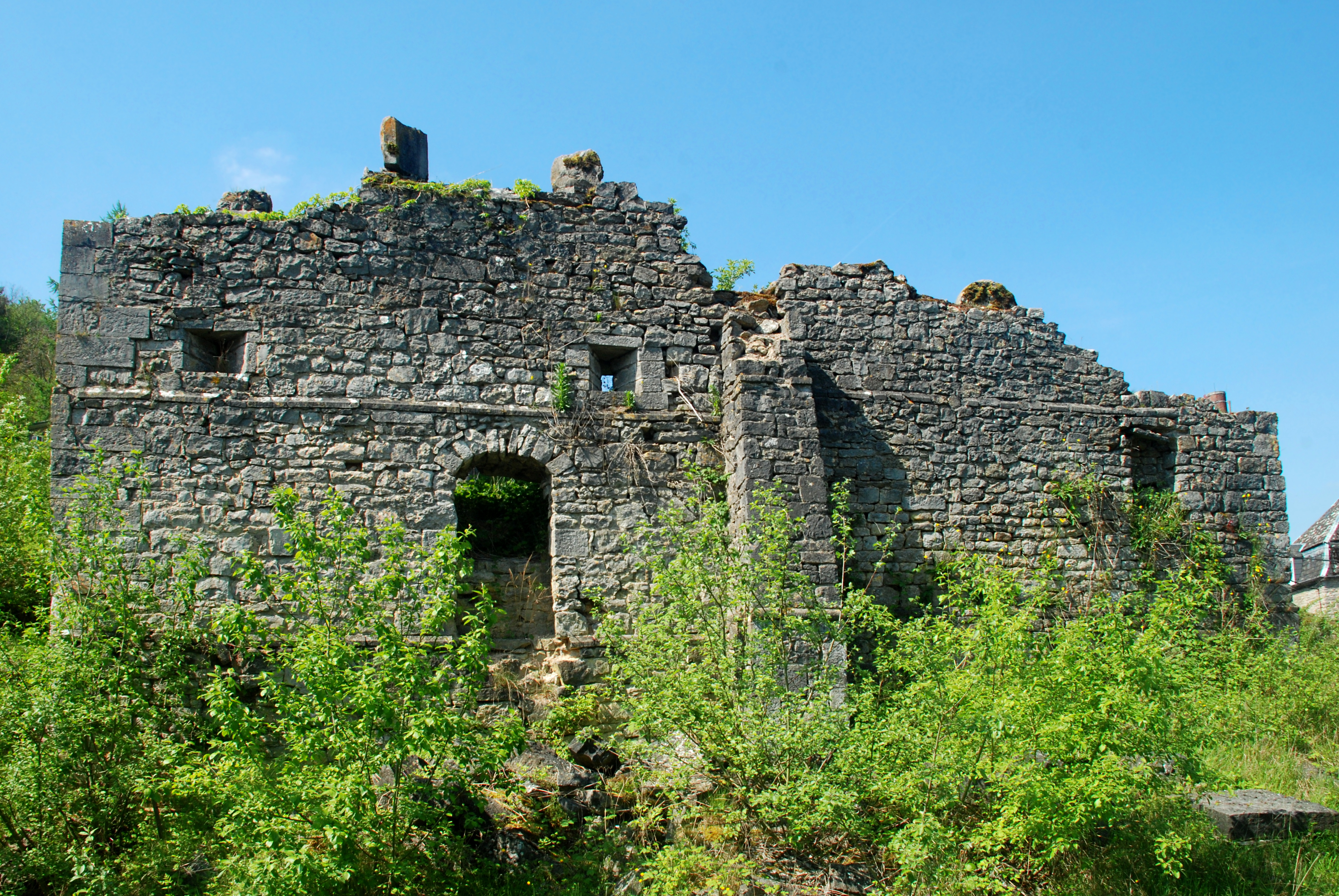 Belgique - Province de Namur - Viroinval - Nismes - Ancienne église Saint-Lambert (1606)